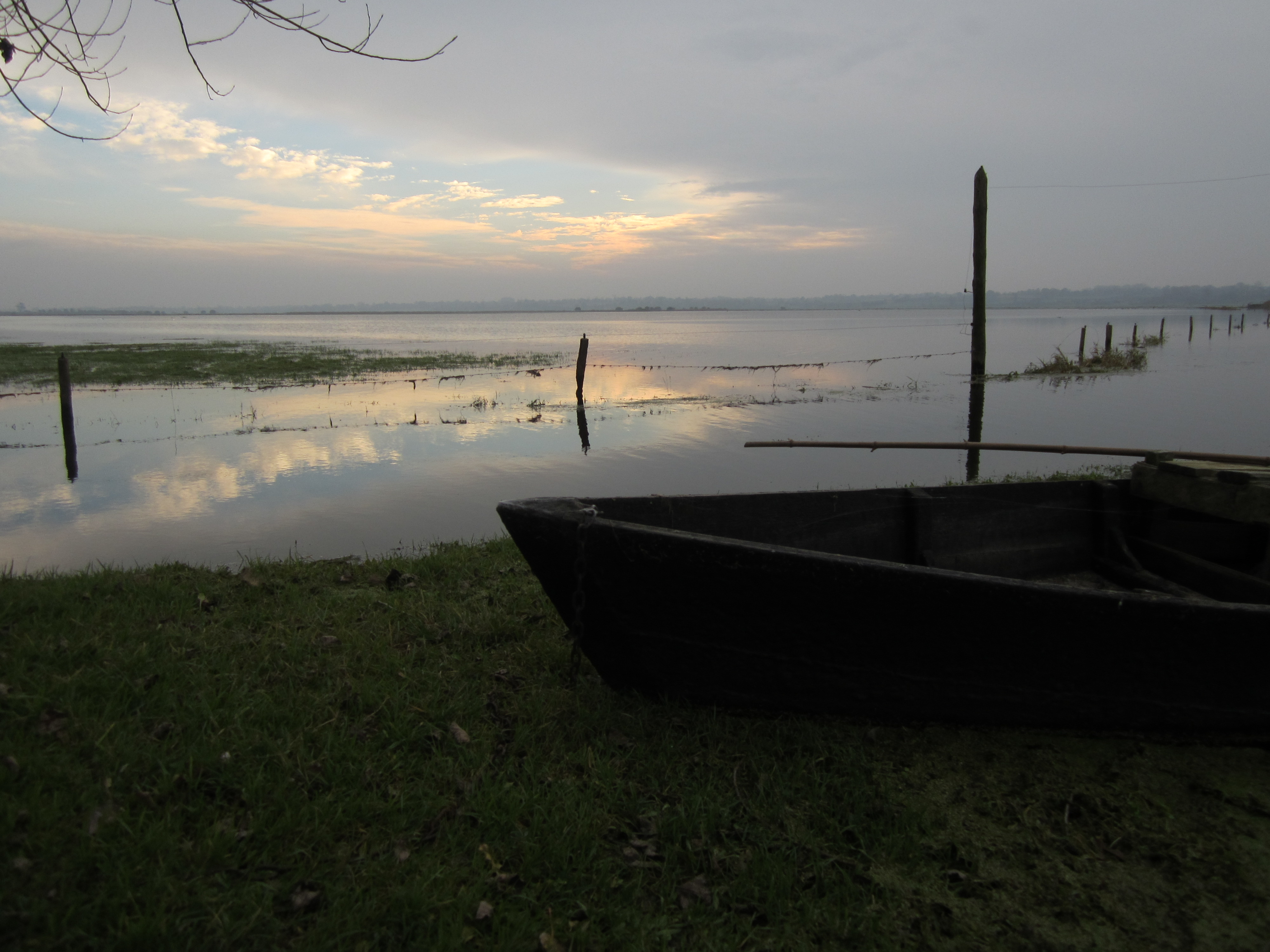 hameau le port, Carquebut, Manche